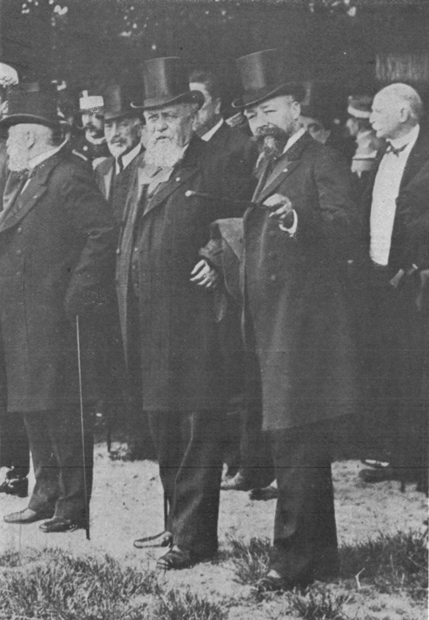 "Nos trois présidents" : MM. Loubet, président de la République, Fallières, président du Sénat et Doumer, président de la Chambre des députés.